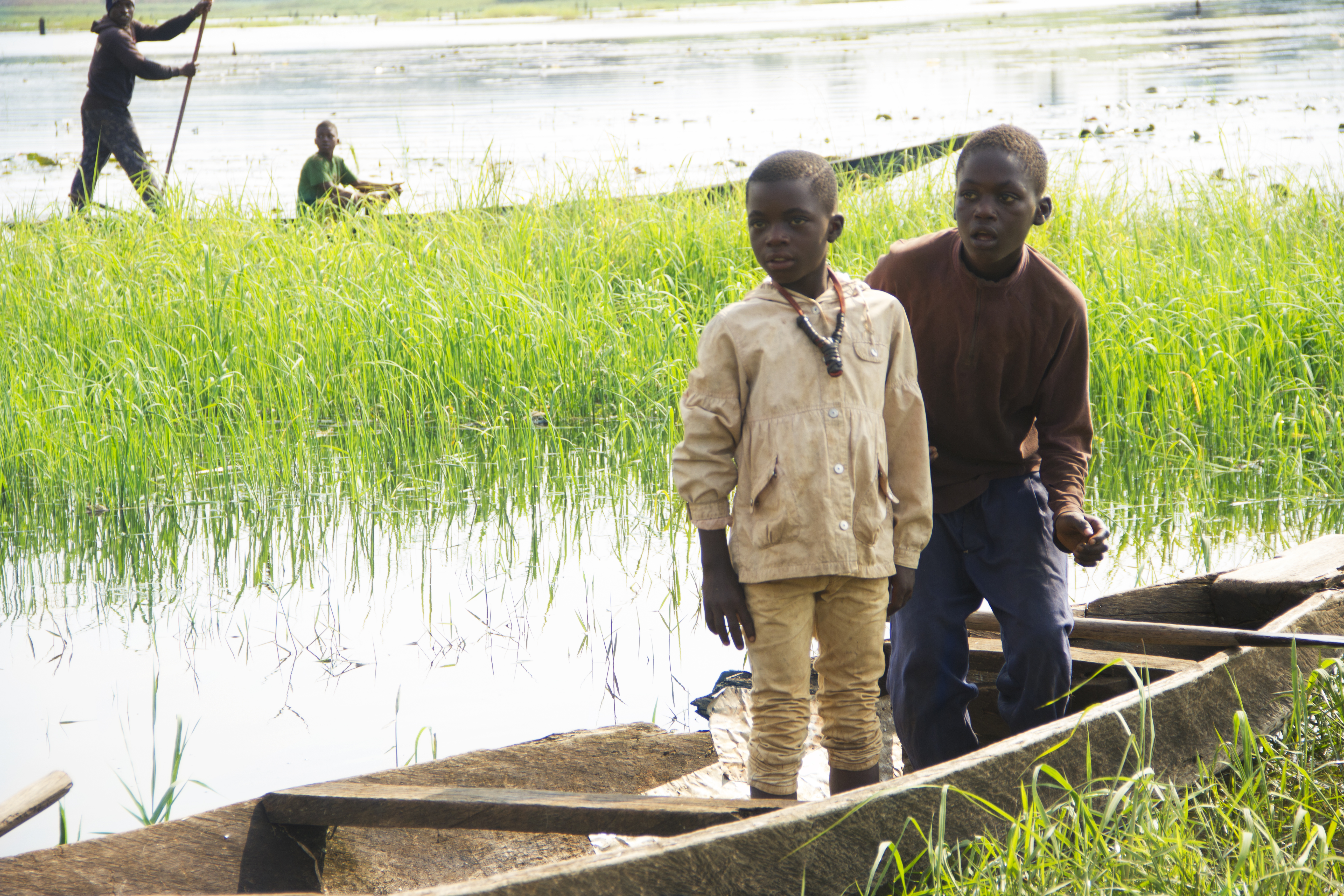 Moyen de transport des déplacés du nord-ouest installés aux rives du fleuve Noun dans le village Bamendjin This is an image with the theme "Africa on the Move or Transport" from: Cameroon